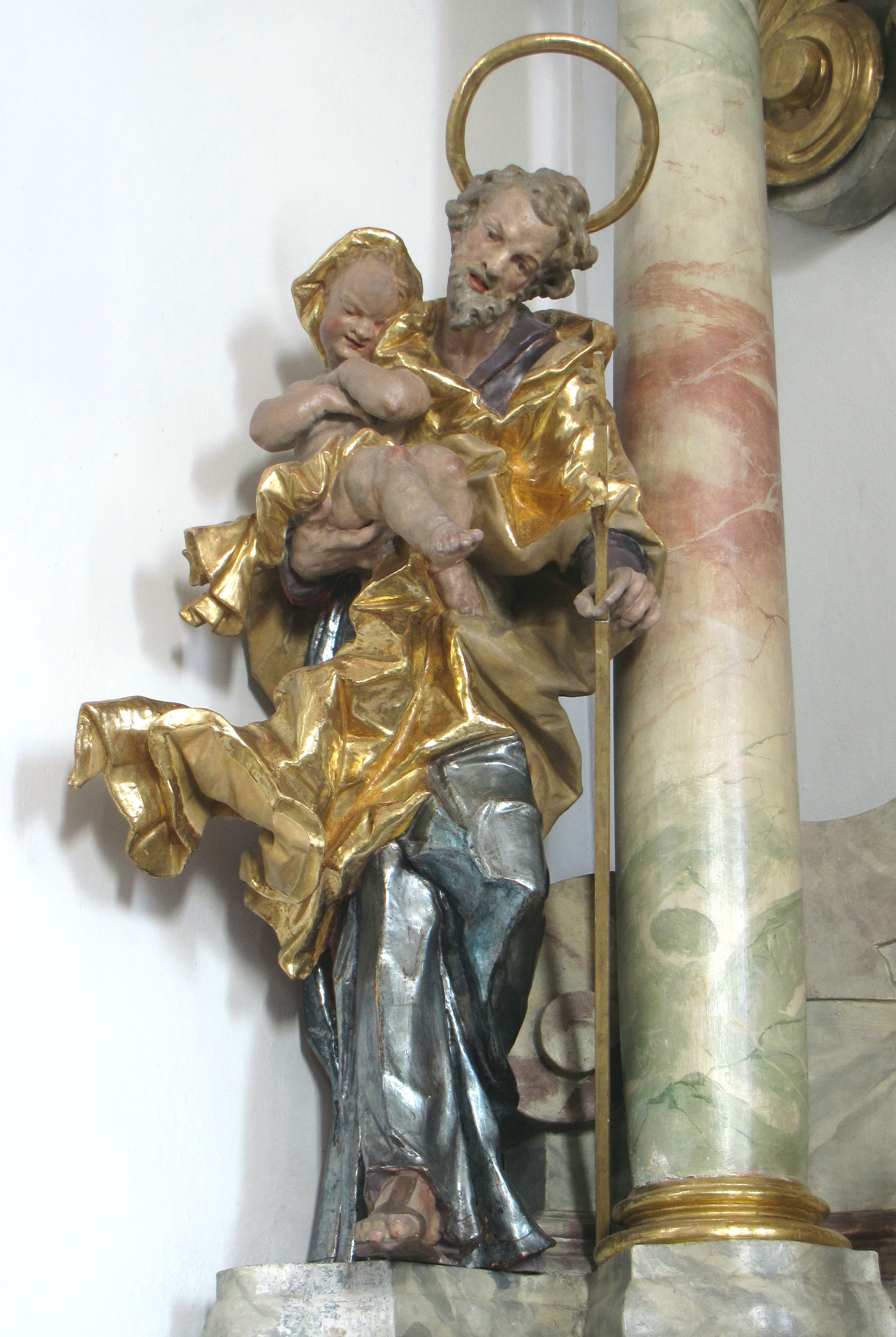 Figur des Hl. Joseph von Peter Heel in der Wallfahrtskirche Maria Hilf in Speiden